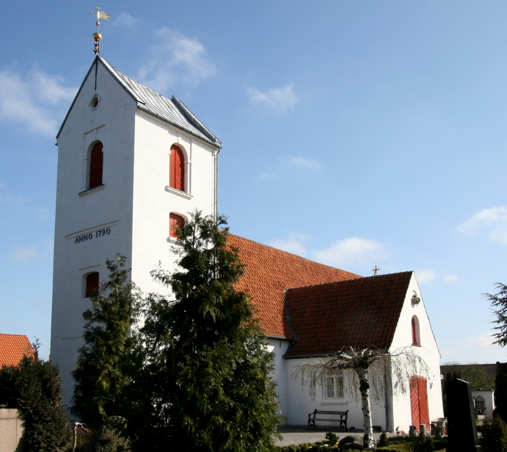 Hvidovre Kirke, Denmark